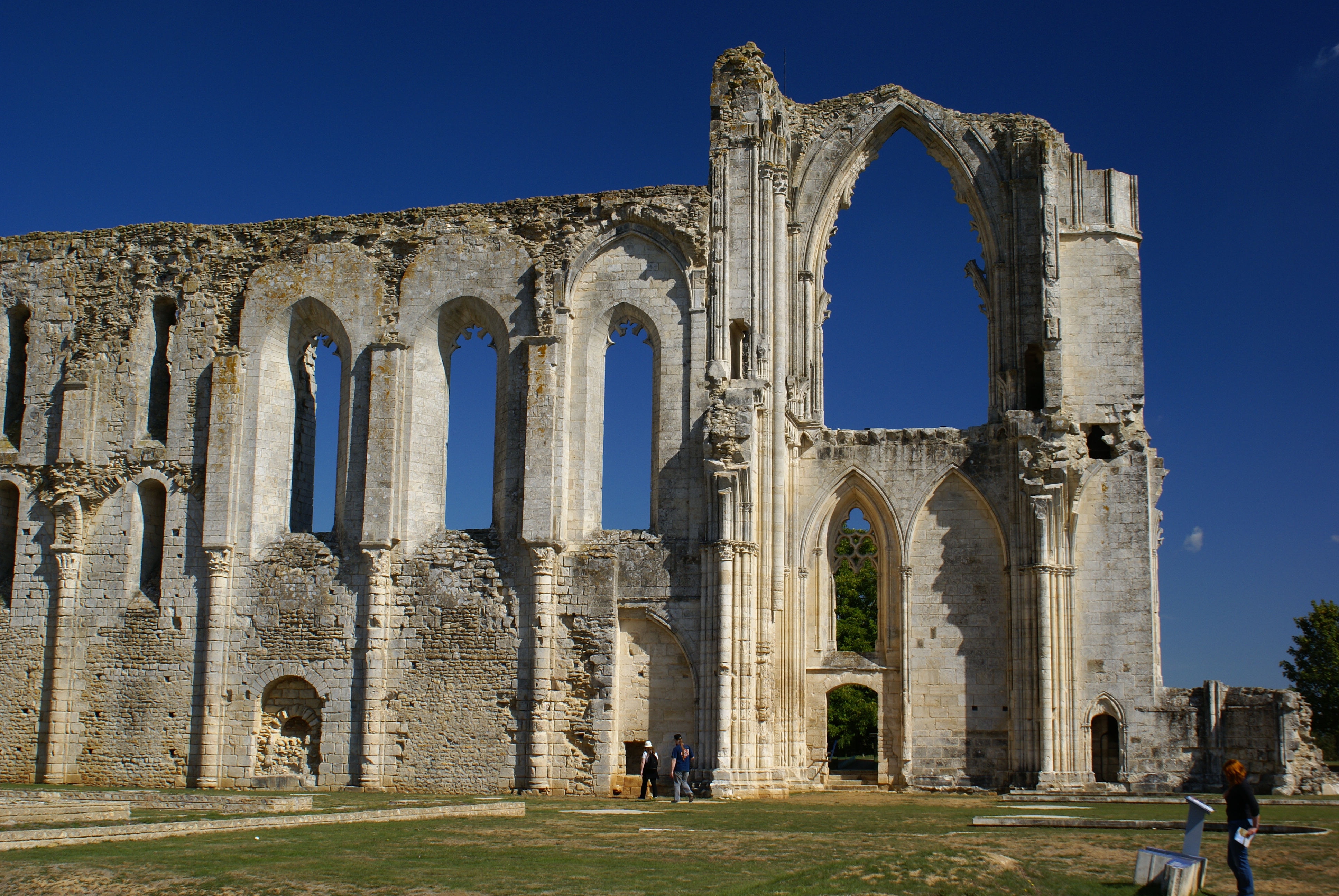 Ruines de l'abbaye de Maillezais - Vieille abbaye Saint-Pierre